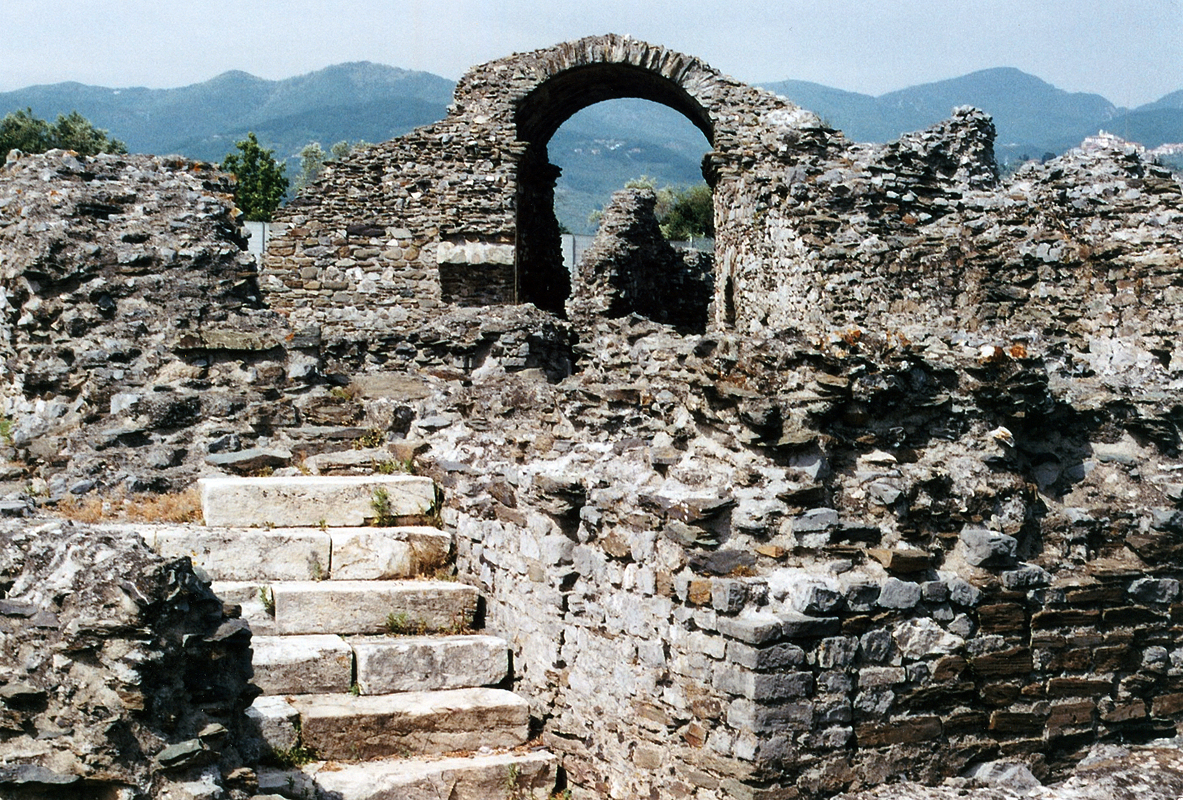 Luna. Im Amphitheater. Provinz La Spezia, Italien.